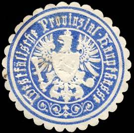 Sealing stamp Title: Westfälische Provinzial - Hauptkasse Description: blau, weiß, geprägt Place: Münster size: 4 cm